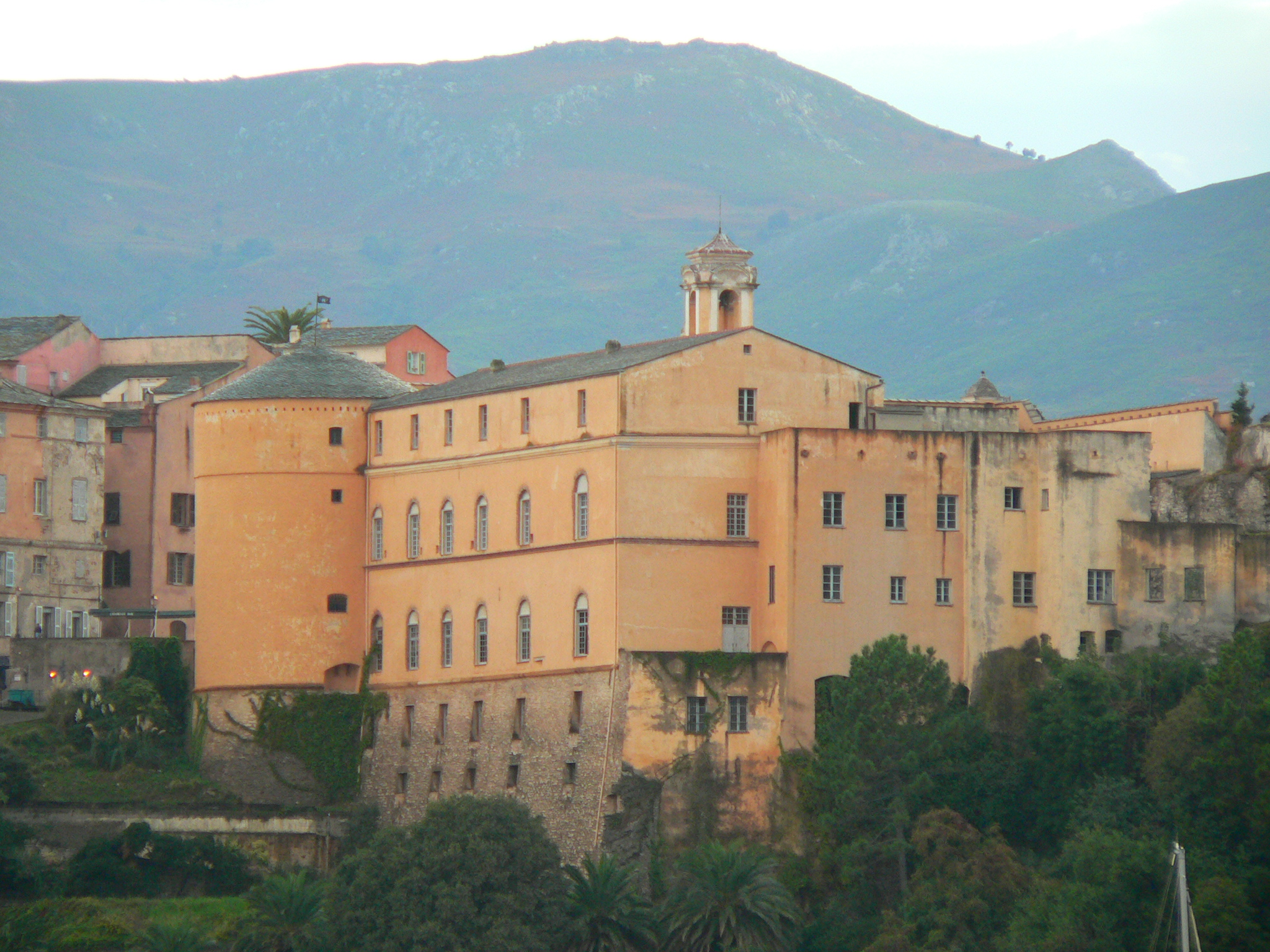 Le Palais des Gouverneurs abrite le Musée de Bastia